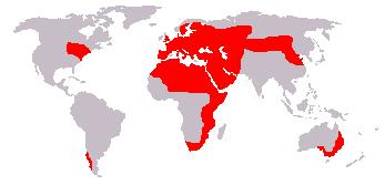 Bewerking afbeelding: Afbeelding_(kaart).JPG